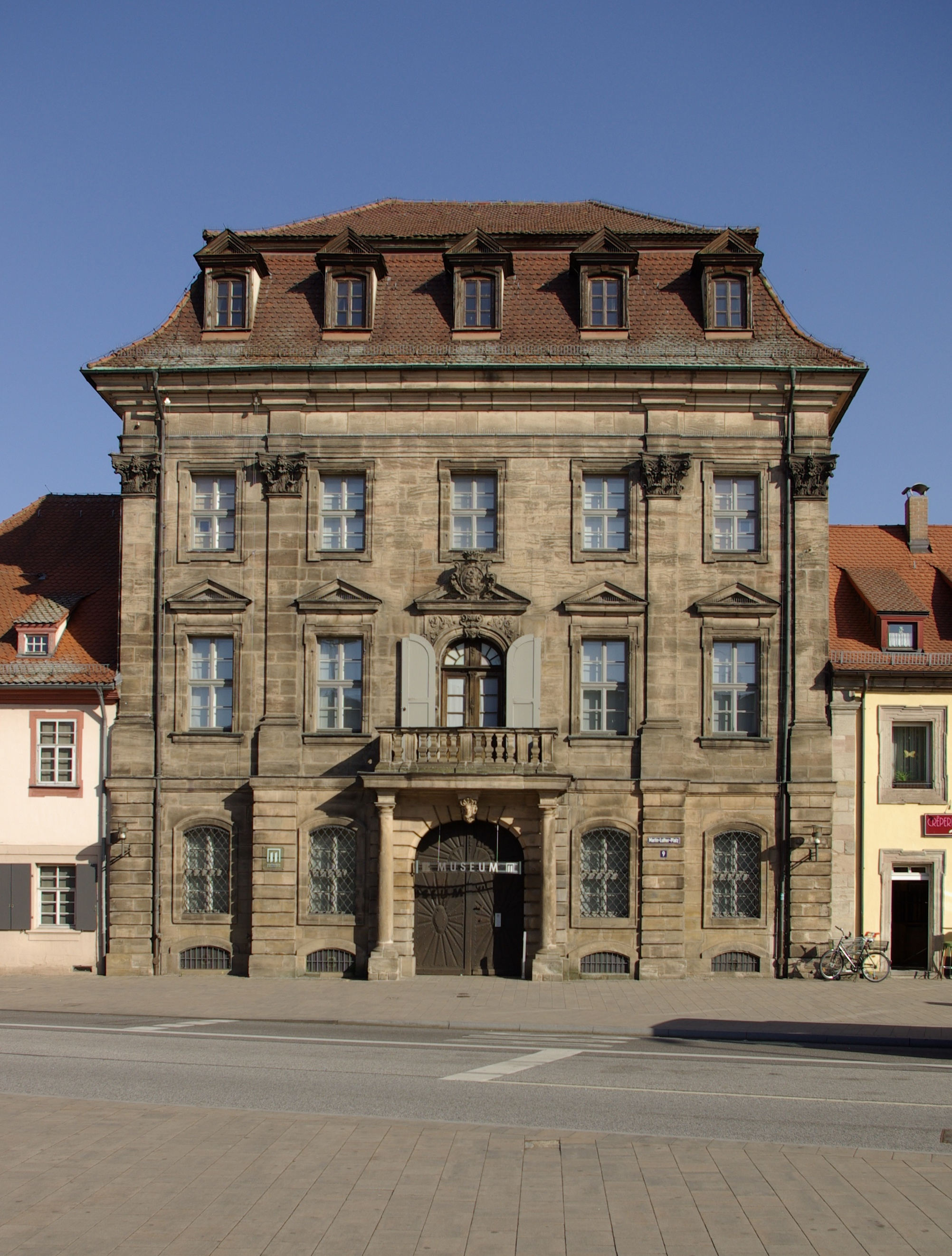 Stadtmuseum Erlangen im ehemaligen Rathaus der Altstadt